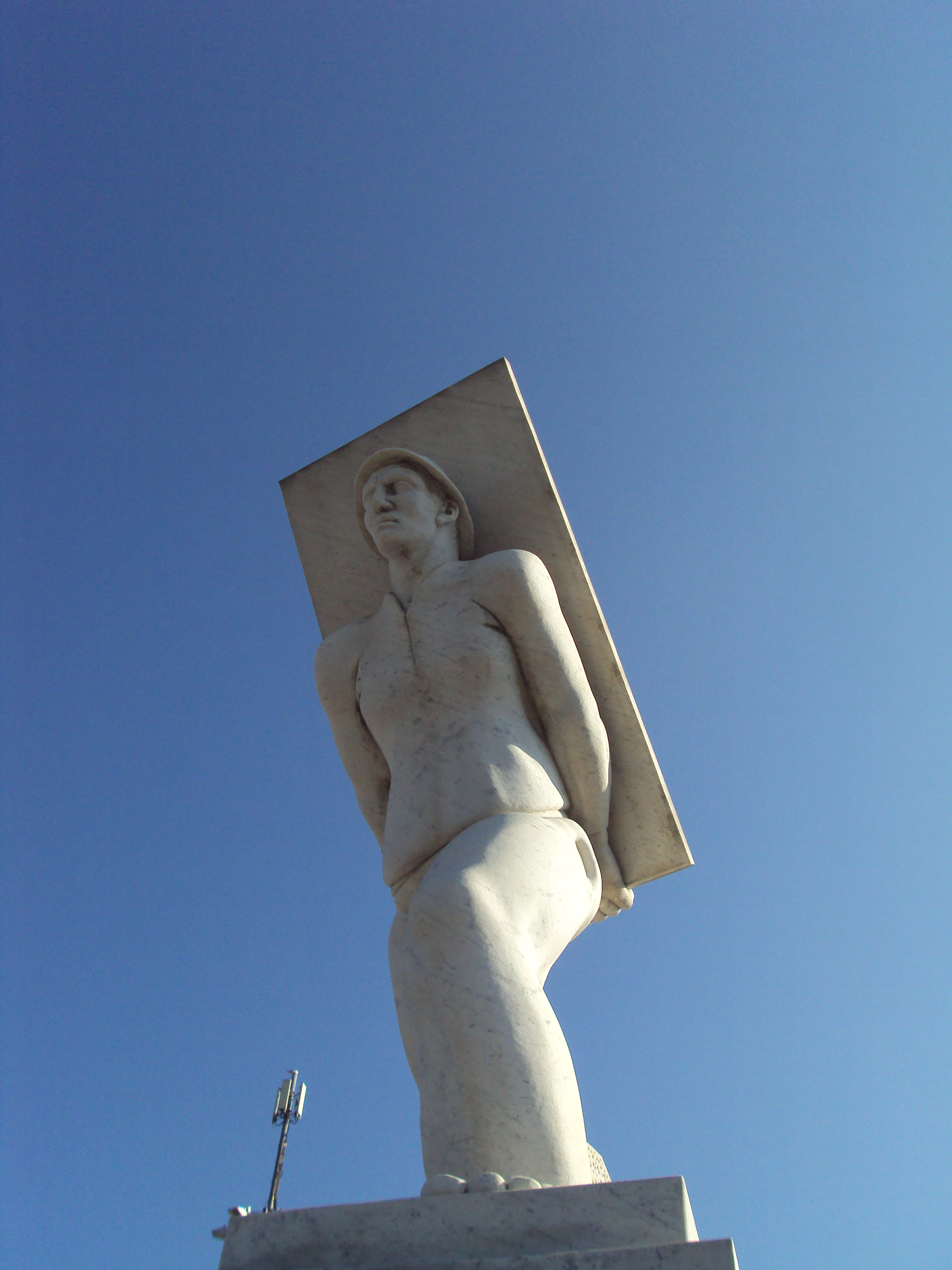 Buscaiol